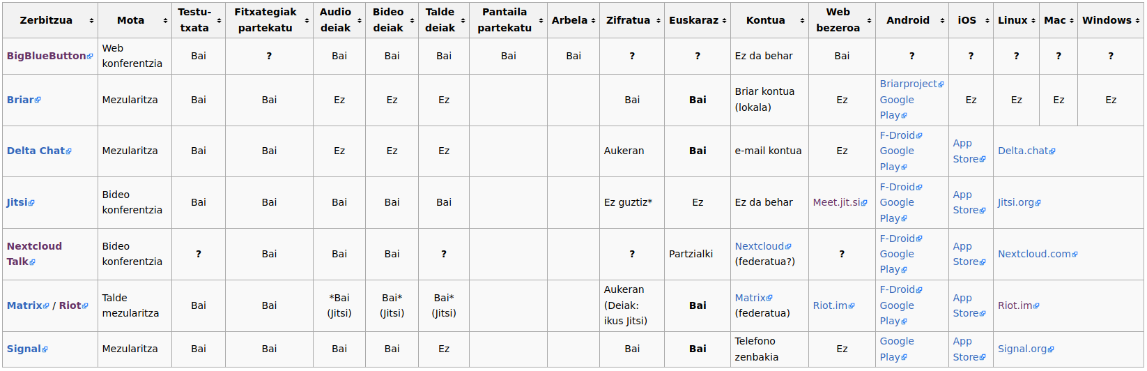 Librezale.eus - Komunikazio eta elkarlanerako tresnak